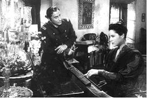 Foto de La Guerra Gaucha (1942), de Lucas Demare. En la foto Amelia Bence y Sebastián Chiola.